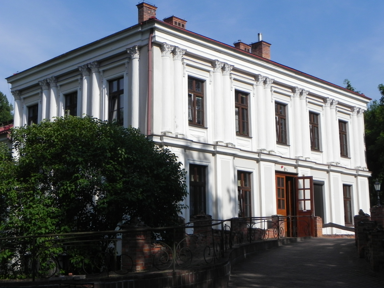 Rokocin - dwór, 1 poł. XIX